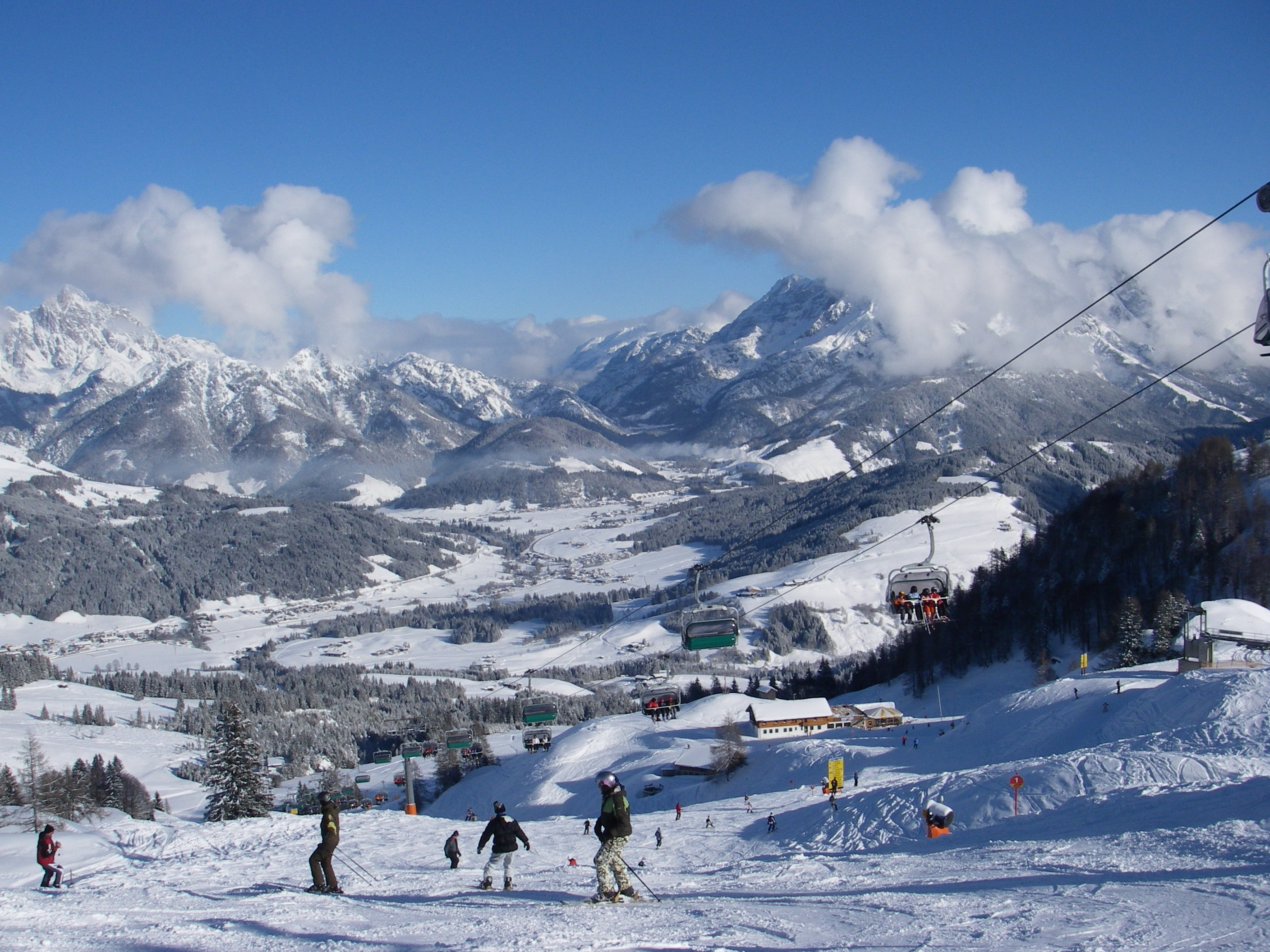 Fieberbrunn